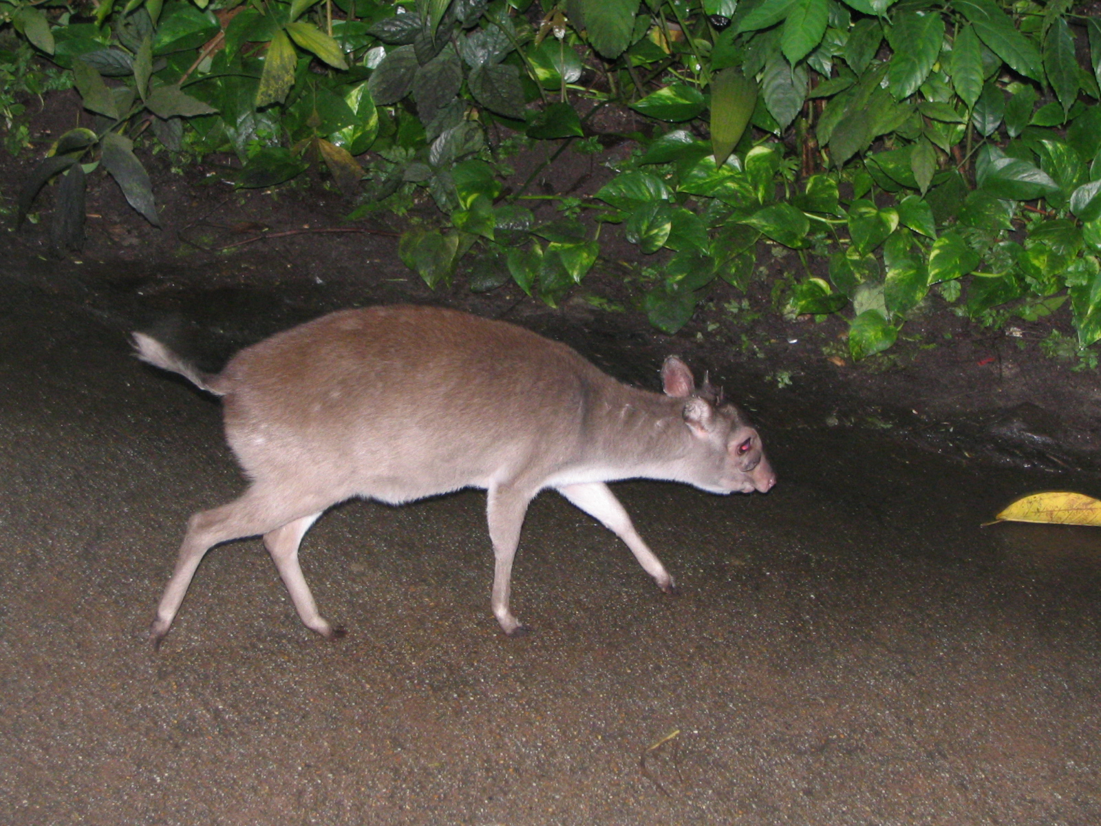 eigen foto. GerardM 4 okt 2004 22:29 (CEST)